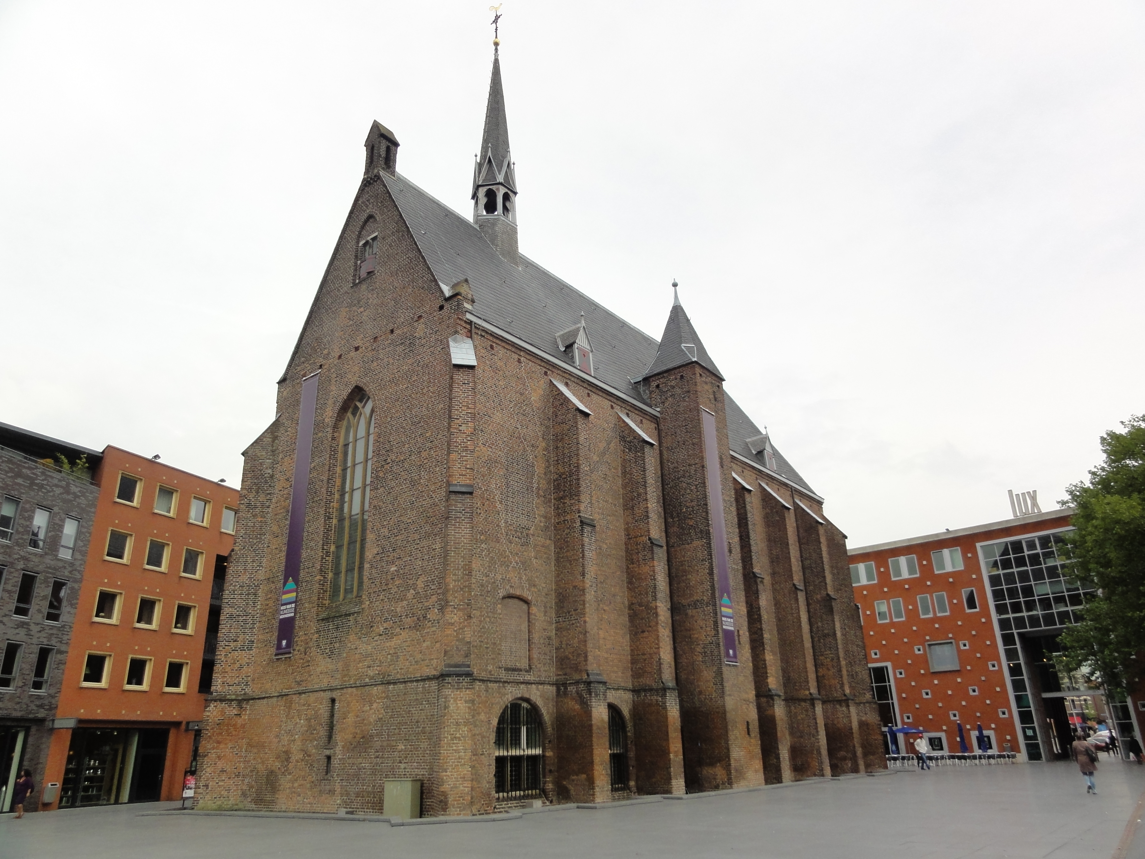 Nijmegen Rijksmonument 31158 Marienburgkapel 03″ N, 5° 51′ 47.6″ E Object location51° 50′ 42.69″ N, 5° 51′ 59.2″ E